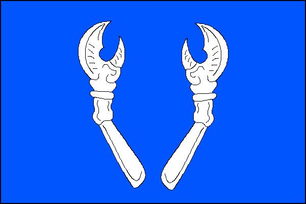 Vlajka obce Železné